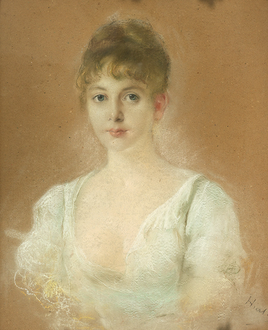 Portrait eines reizenden Mädchens im weißen dekolletierten Spitzenkleid